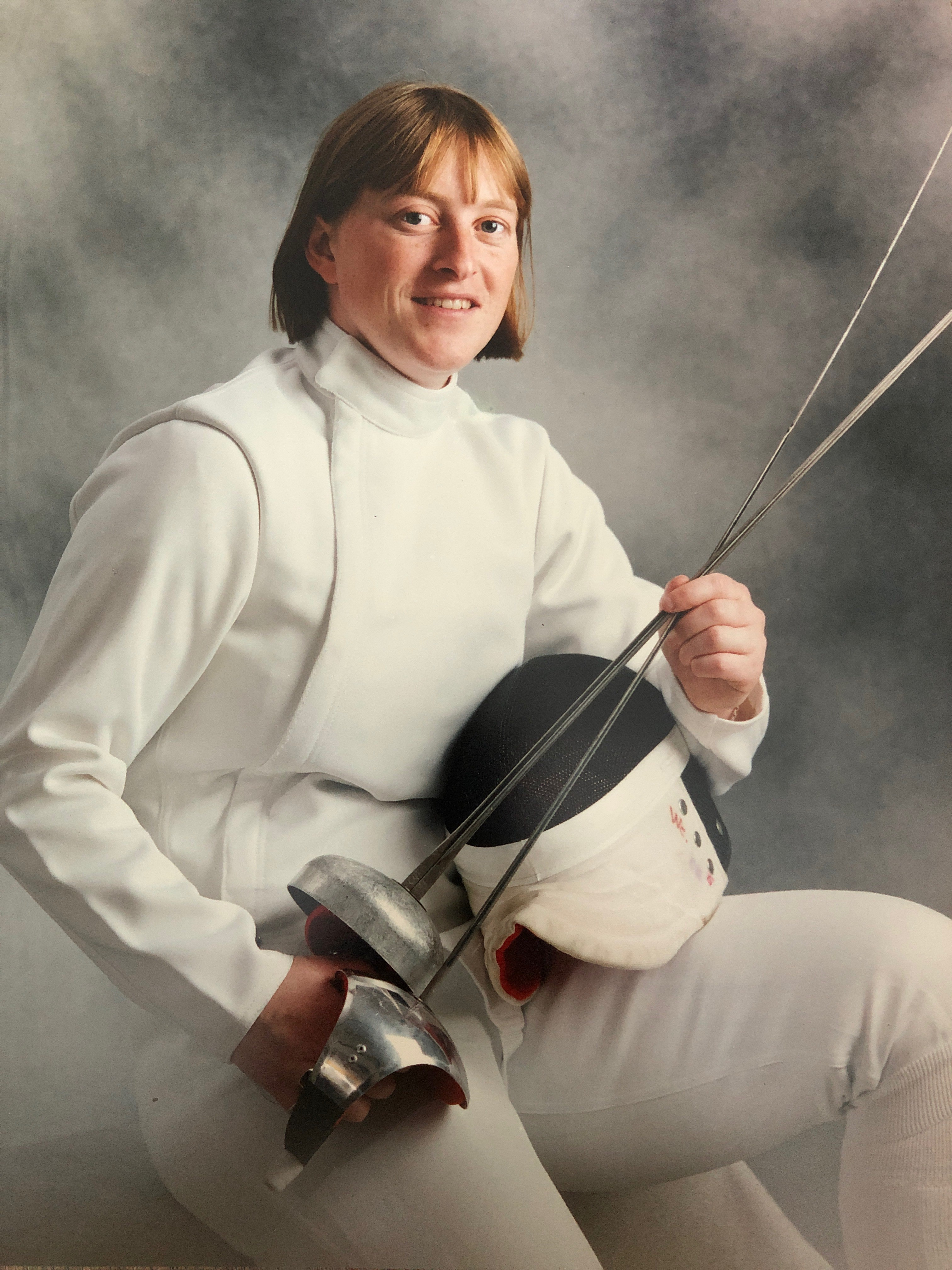 Rebecca - Wereldkampioen Schermleraren op Sabel en Degen 1994